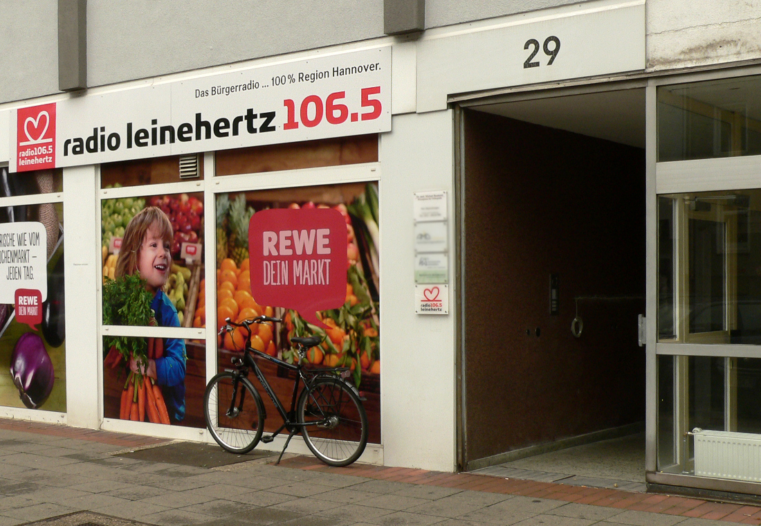 Sitz von radio Leinehertz 106.5